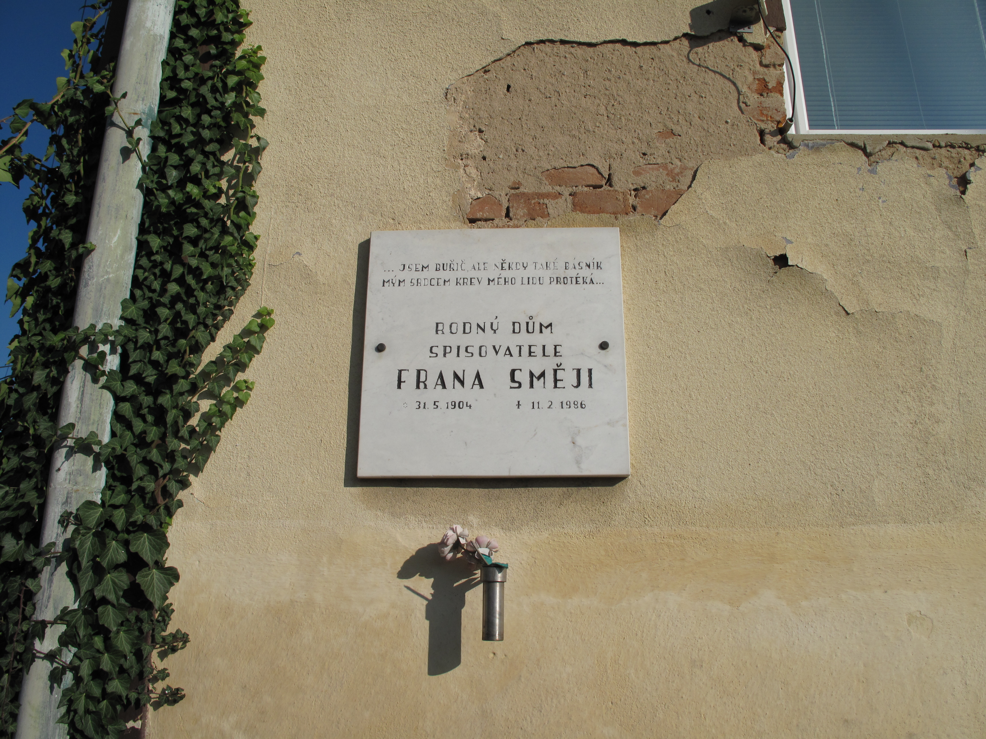 Suché Lazce. Okres Opava, Česká republika.